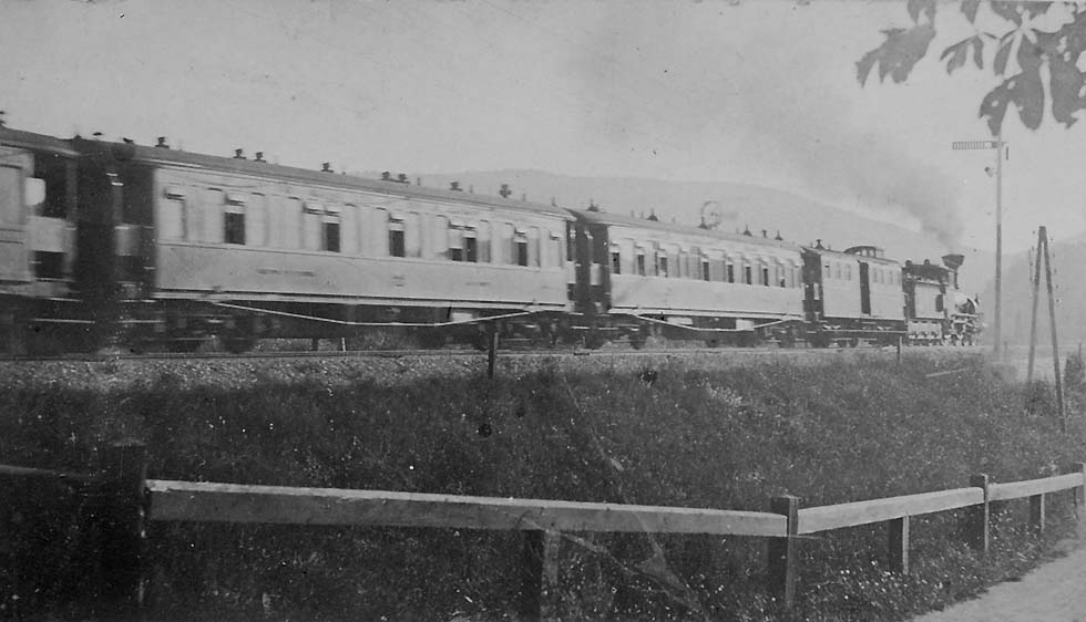 Ältestes bekanntes Foto des Orient-Express, 1885 bei Wien, bespannt mit kkStB-Reihe 4